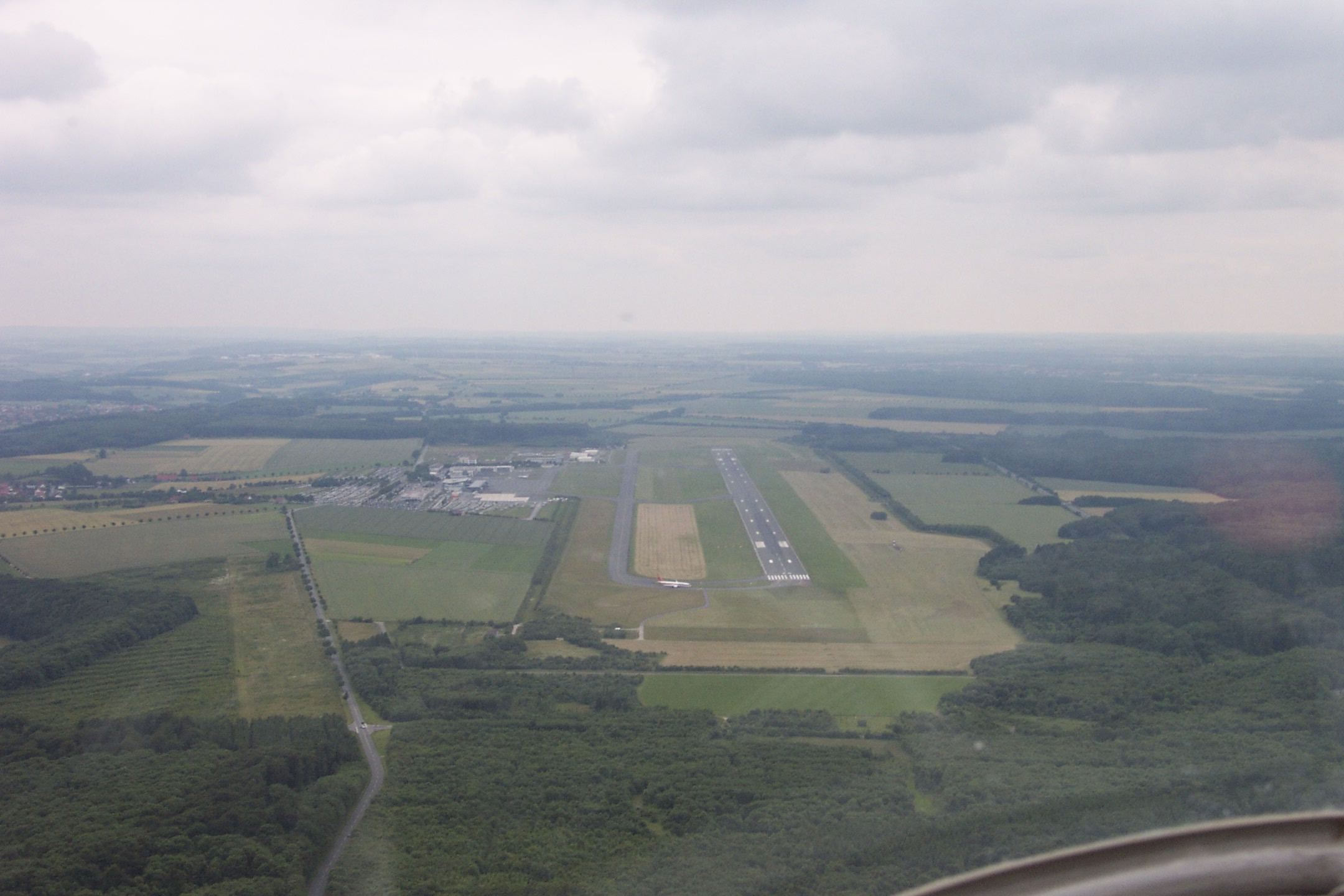 Luftaufnahme Flughafen Paderborn in Büren